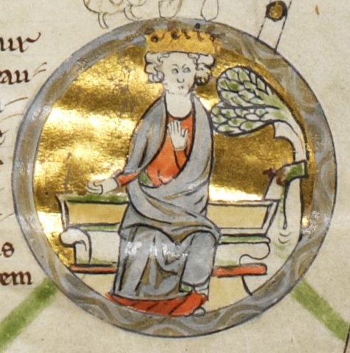 Miniature d'Edmond Ier d'Angleterre dans une généalogie royale du XIIIe siècle.